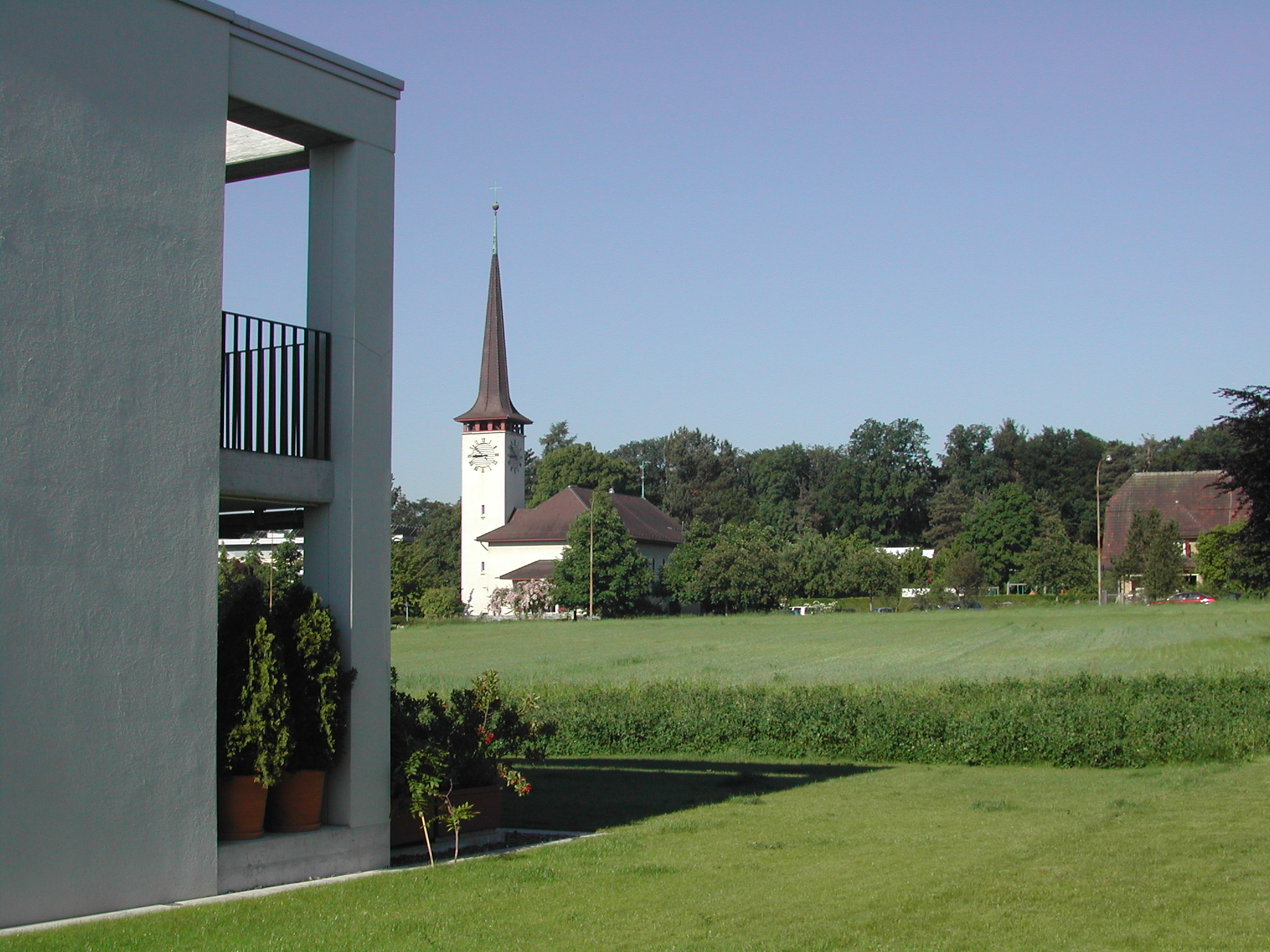 Zollikofen, Bern, Switzerland